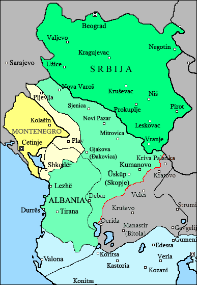 Teritorije koje je Kraljevina Srbija privremeno osvojila u Prvom balkanskom ratu 1912. godine.